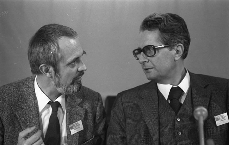 Parteitag der SPD in Mannheim (links: Peter von Oertzen, rechts: Hans-Jochen Vogel) 11.-15.11.1975